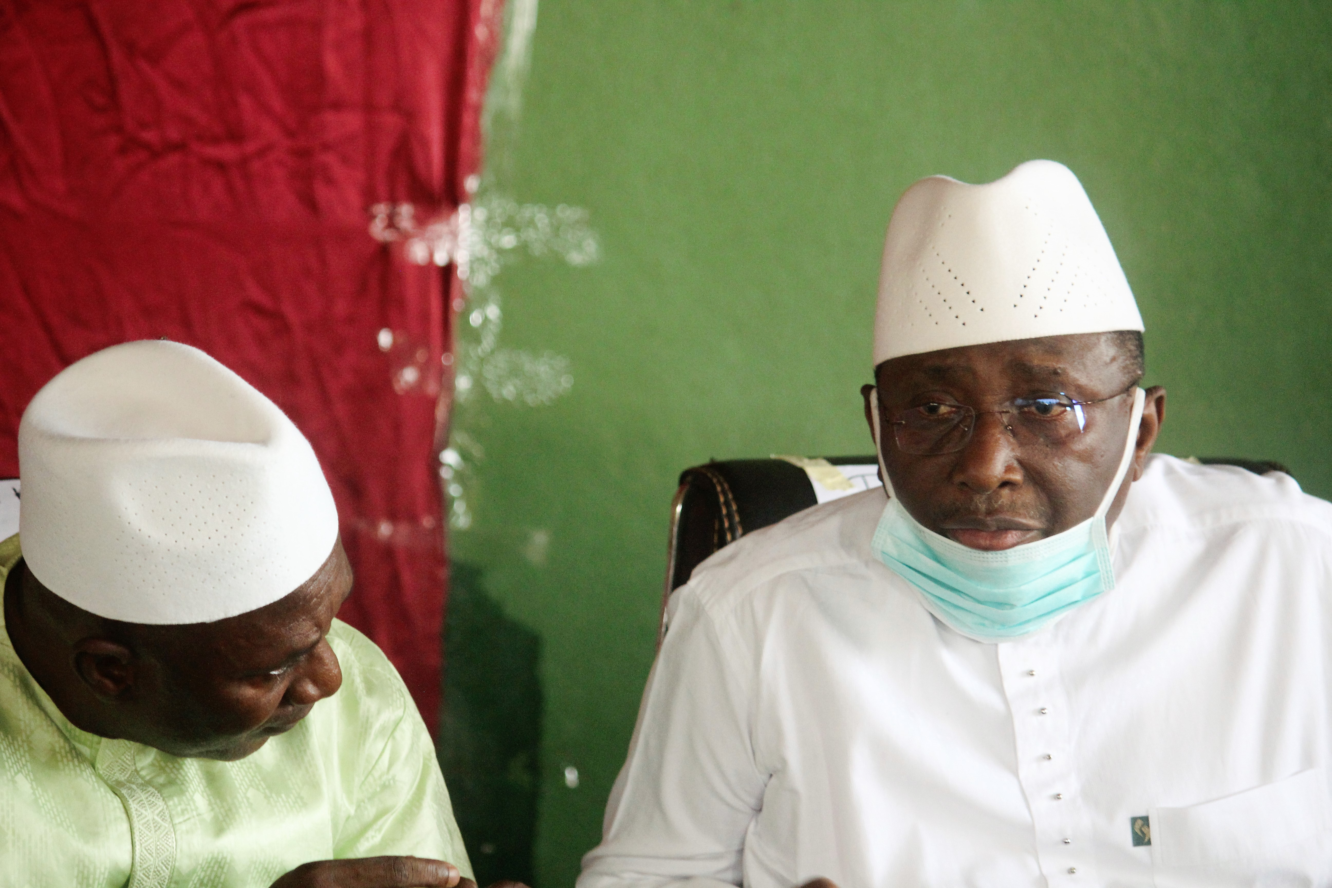 Abdourahmane Sanoh et Sidya Touré a une conférence du FNDC